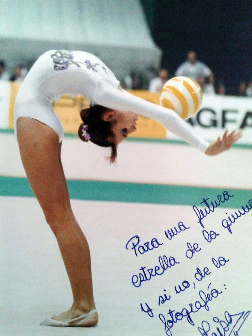 La gimnasta española Maisa Lloret en el Campeonato Europeo de Gimnasia Rítmica de Florencia en 1986.